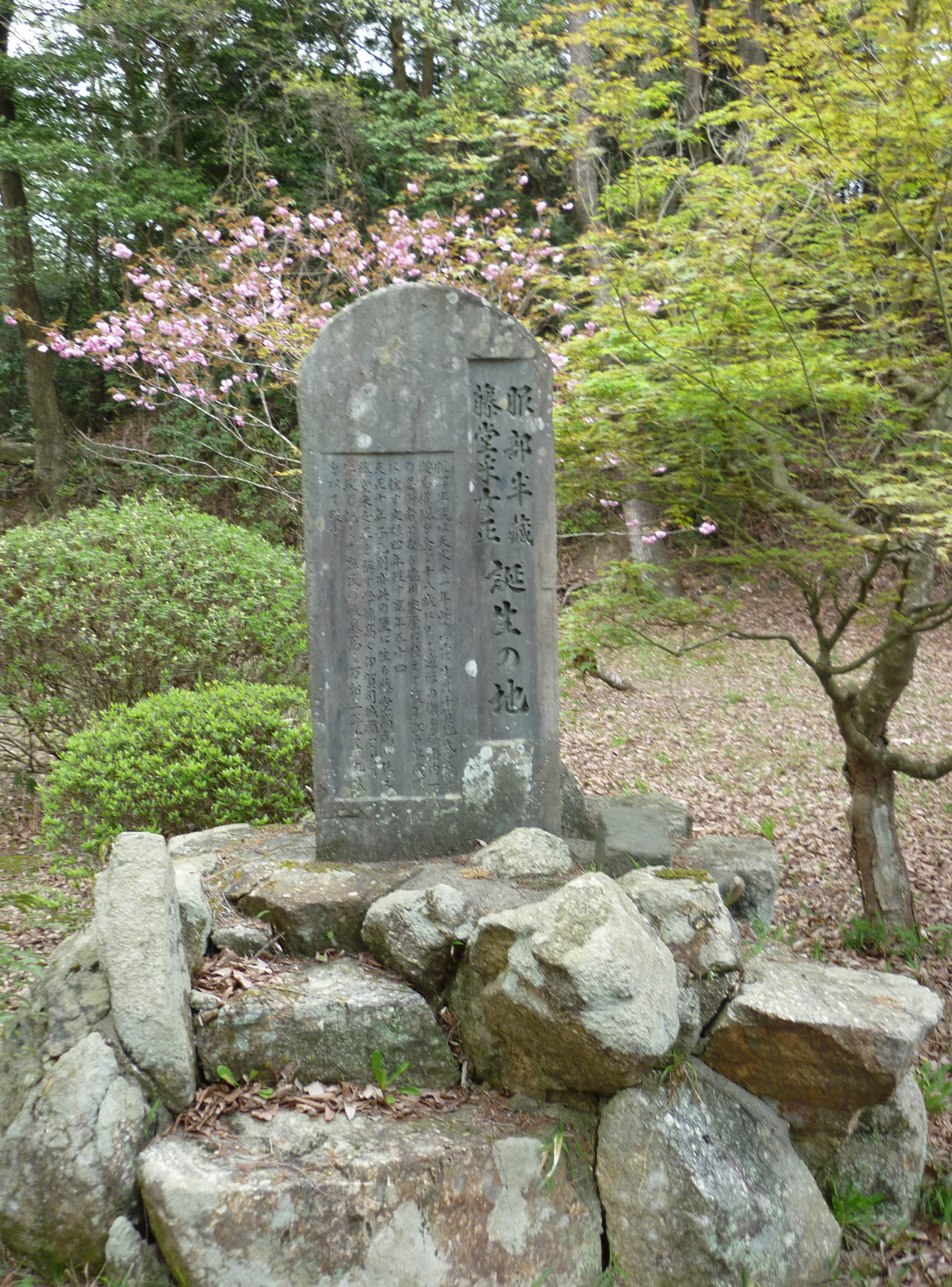 服部半蔵と藤堂采女の石碑